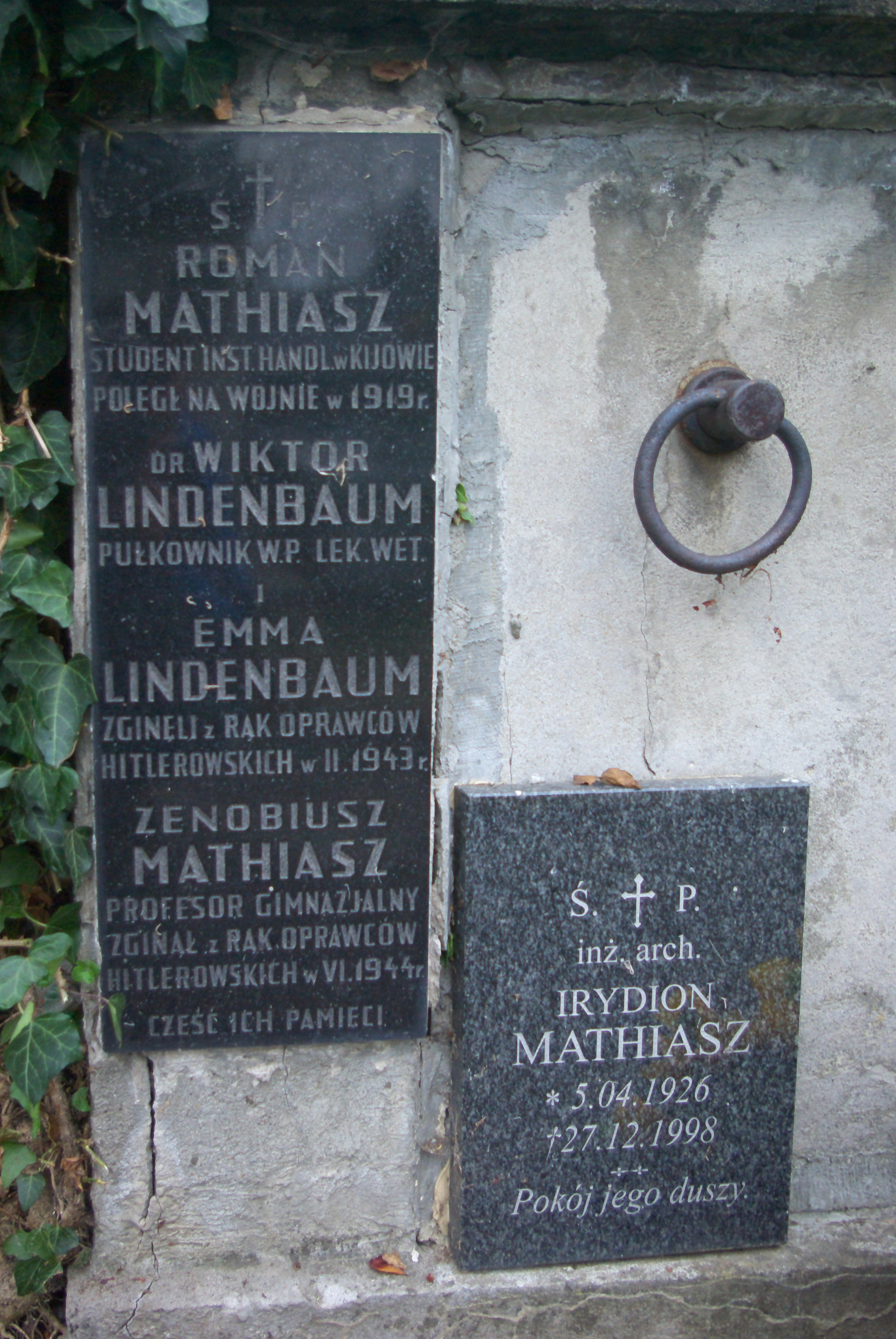 Grobowiec rodziny Mathiaszów na Cmentarzu Centralnym w Sanoku. Irydion Mathiasz. Symboliczne upamiętnienie Romana i Zenobiusza Mathiszów oraz płk. dr. Wiktora Lindenbaum i żony Emmy